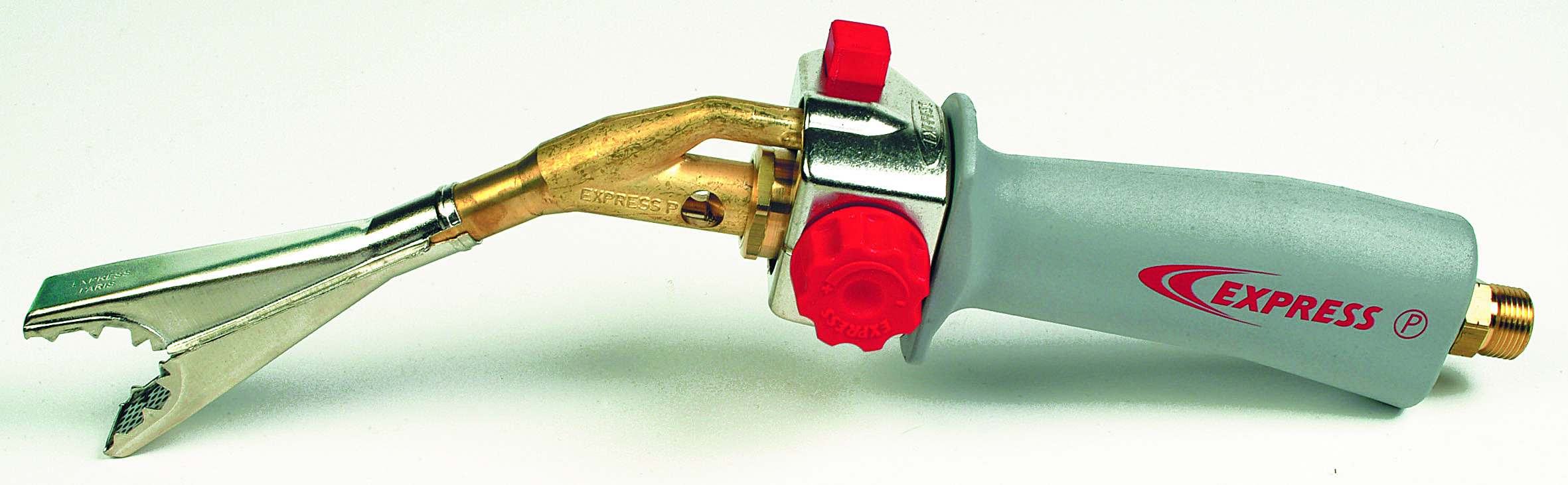 Exemple de chalumeau Express équipé d'un cercoflam permettant de répartir harmonieusement la chaleur sur la pièce à souder